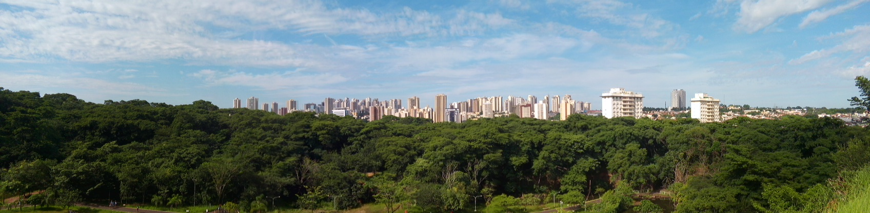 Panorama dos bairros Jardim Irajá e Santa Cruz - Zona Sul de Ribeirão Preto a partir do Parque Curupira, em 2016.